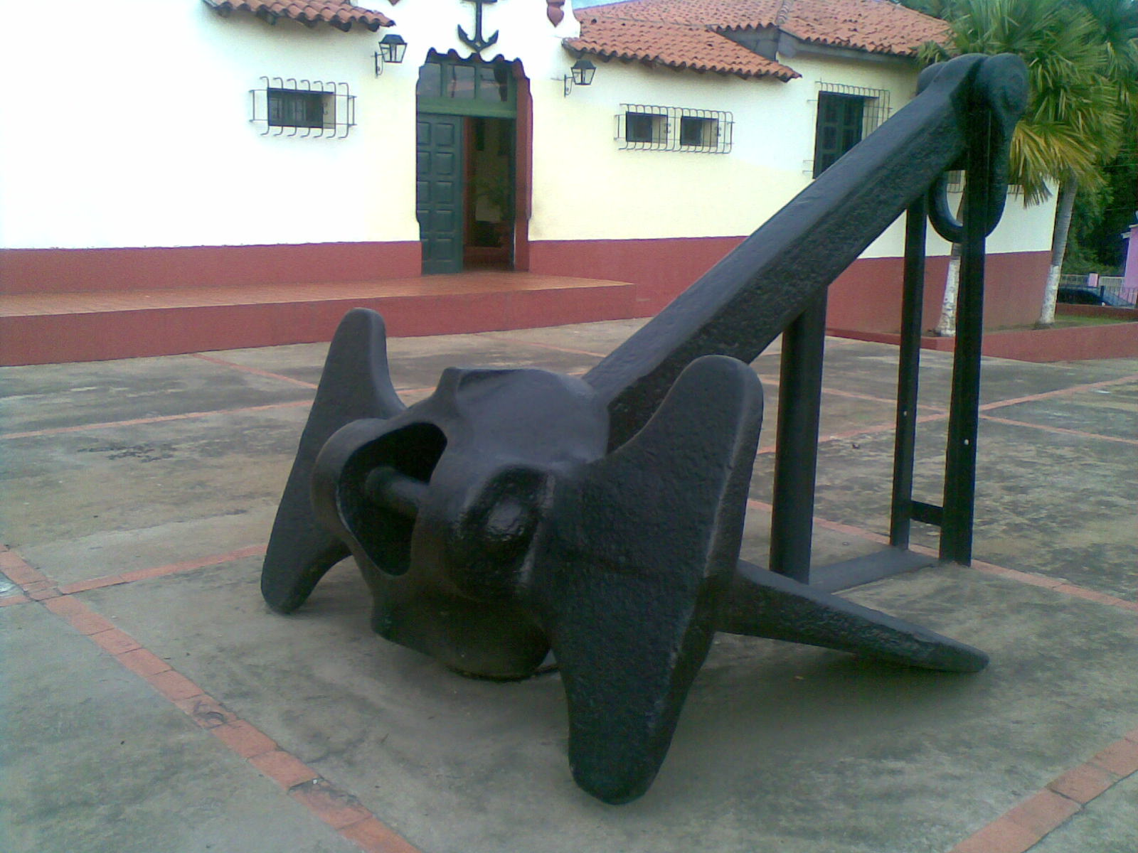 esto se encuentra en el estado bolívar y es una vieja ancla de un barco que se encuentra en una pequeña plazita